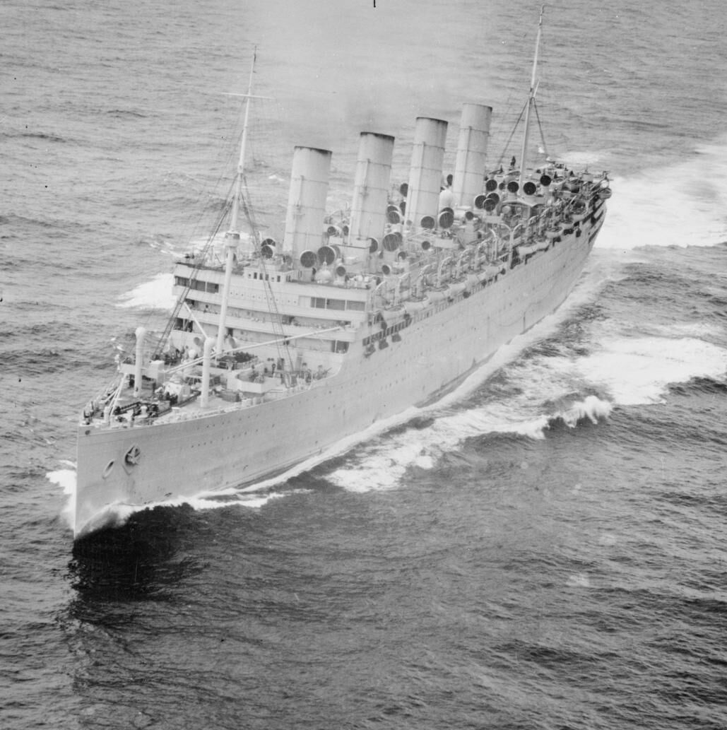 RMA Aquitania at WWII